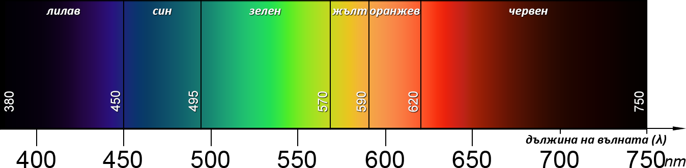 Видим цветен спектър